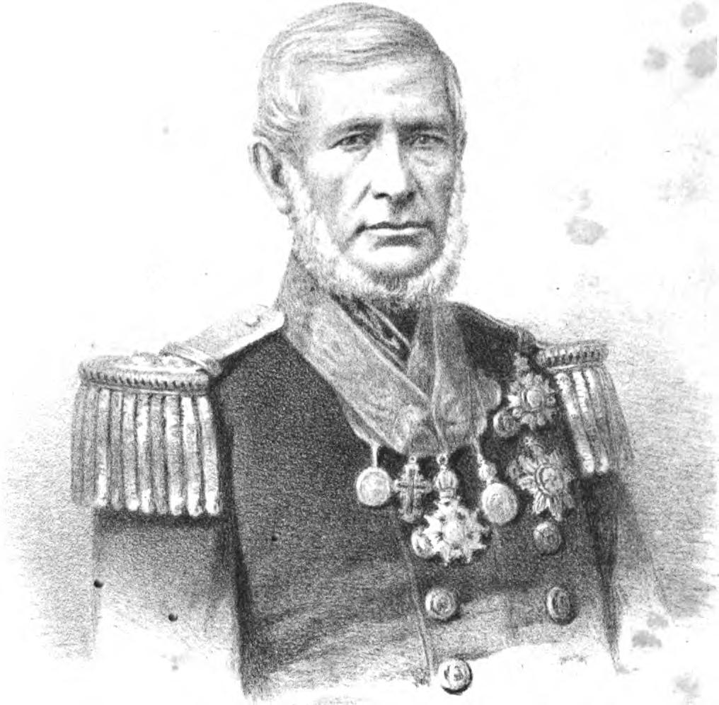 Almirante Francisco Manuel Barroso da Silva, Barão do Amazonas.